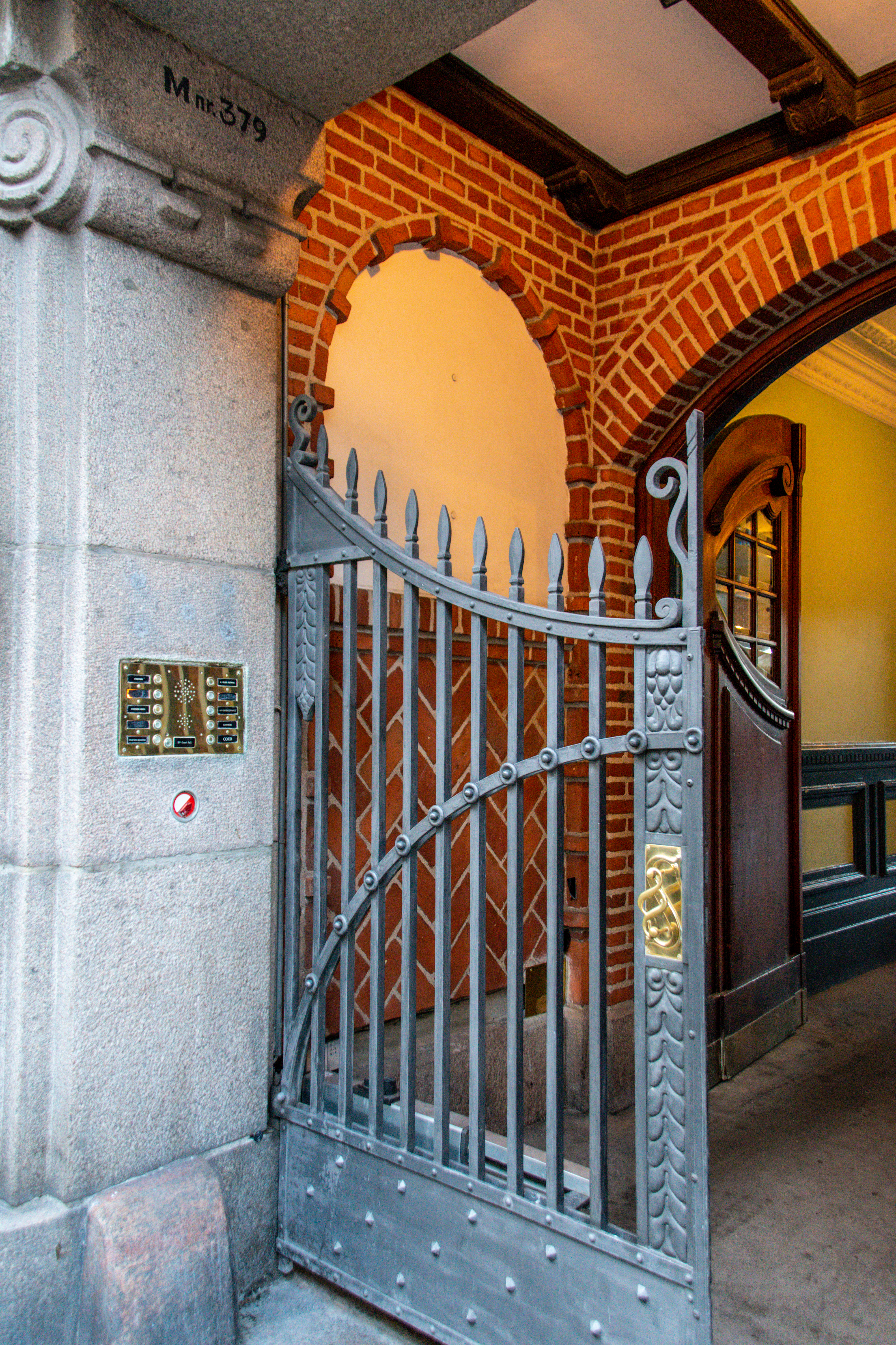 Gate at Store Strandstræde 19-21 ub Copenhagen, Denmark